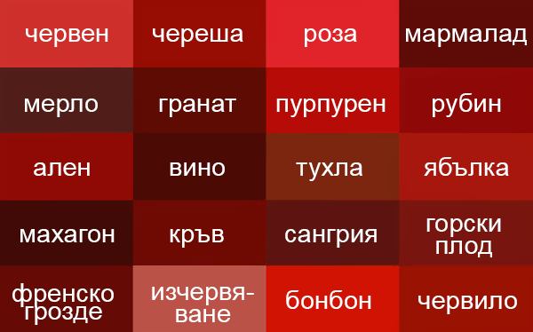 Червени цветове